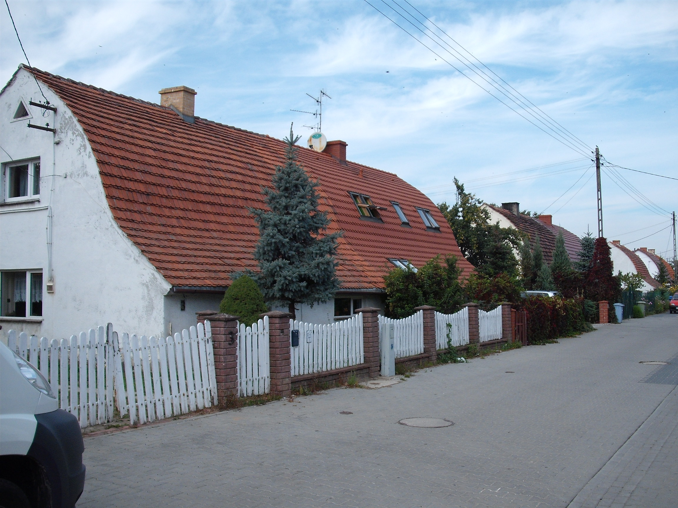 Wrocław, ul. Strączkowa, fragment części nieparzystej od południa